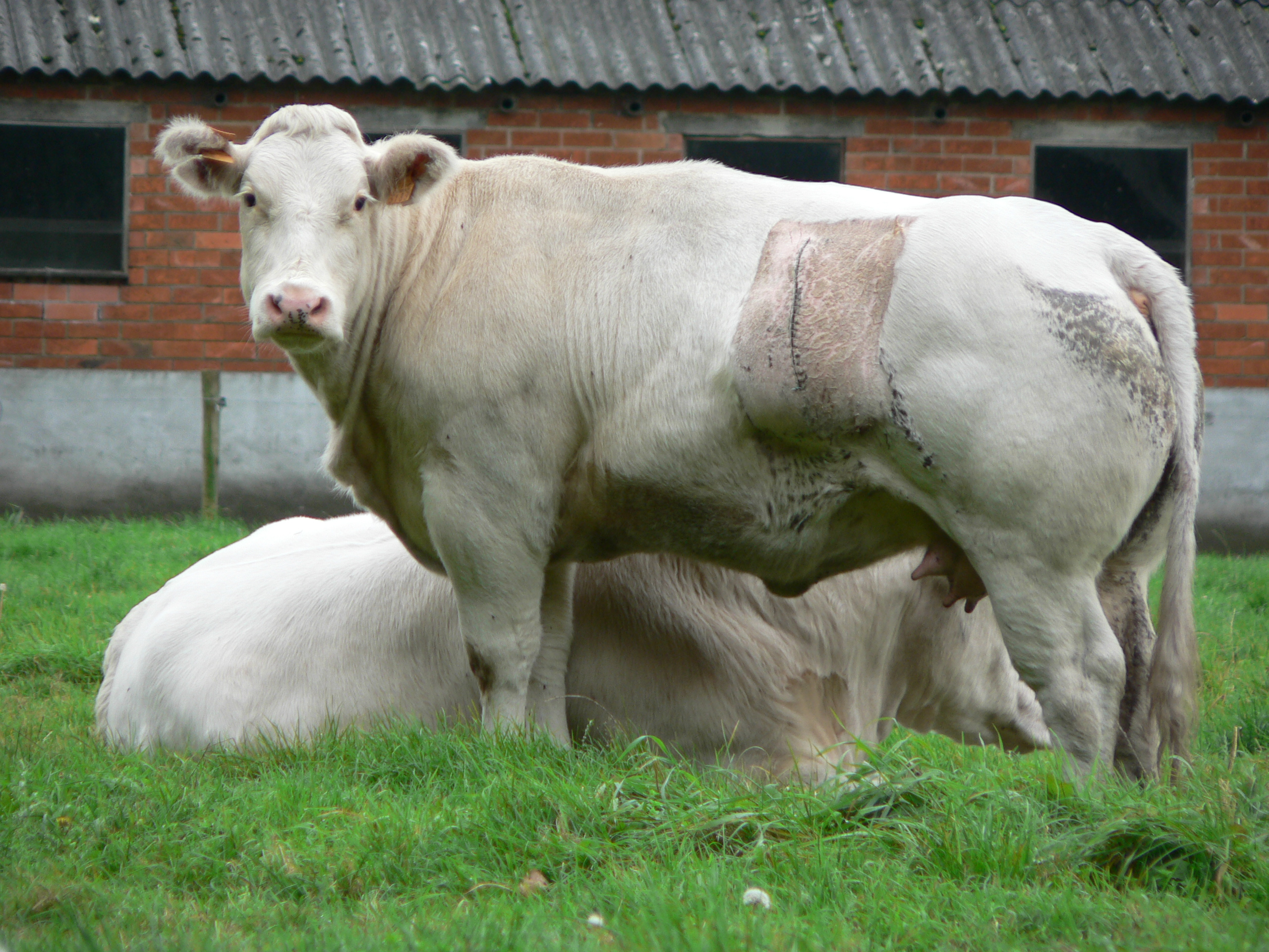 belgisch wit-blauwe koe met een litteken van een keizersnee op de linkerflank; Retie (nabij Geenend) - - eigen foto Categorie:Afbeelding rund